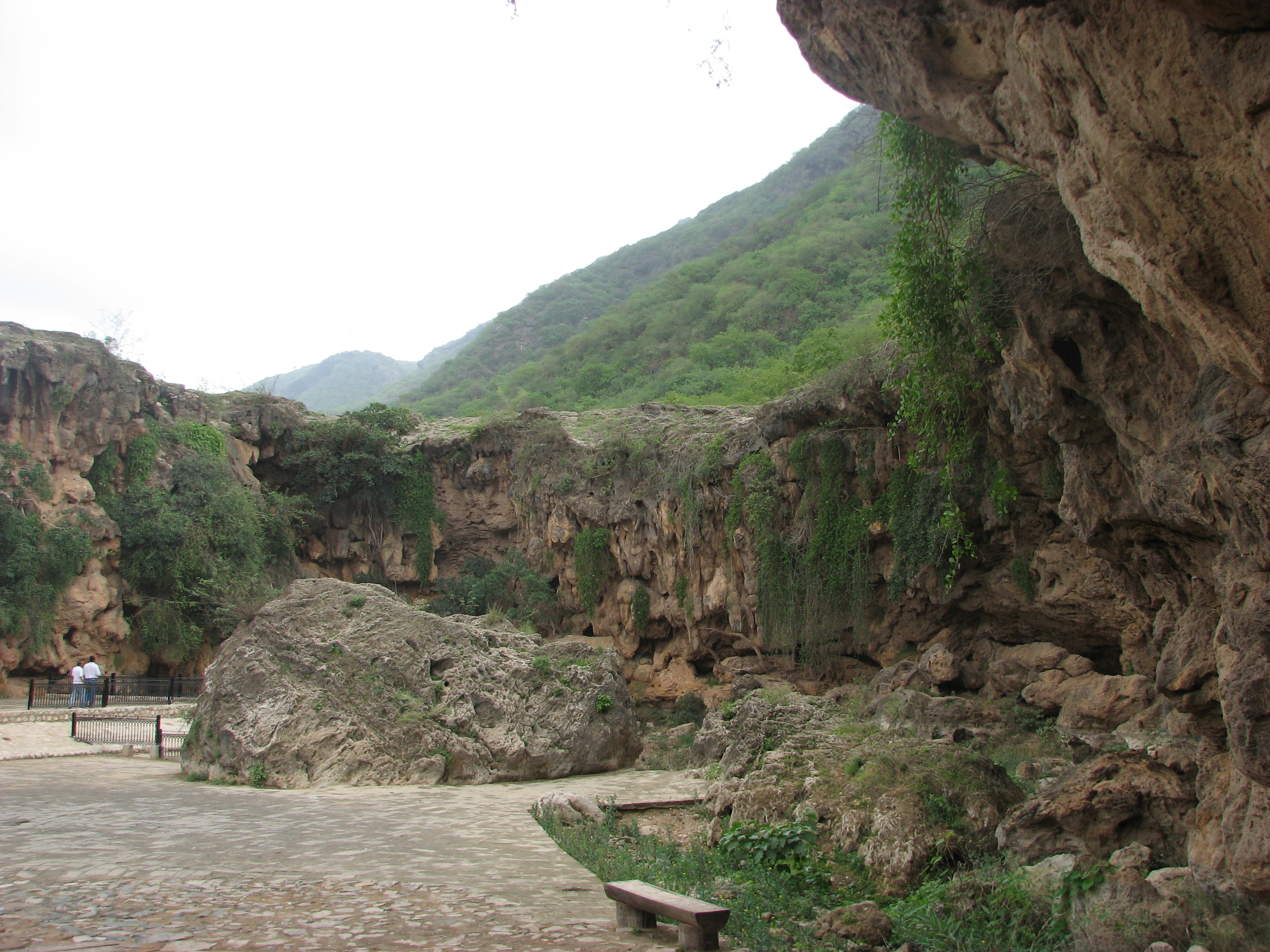 Ayn Jarziz